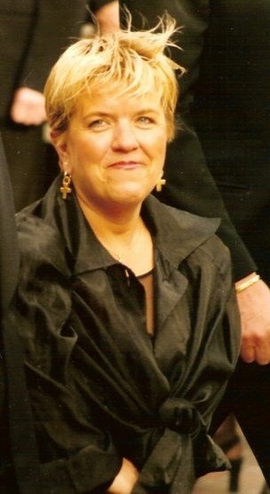 Mimie Mathy au festival de Cannes